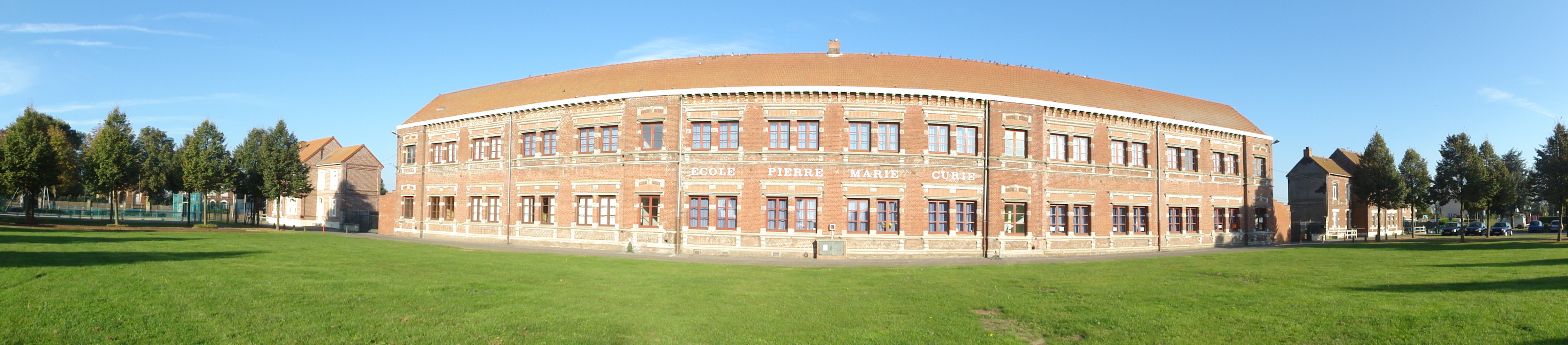 Écoles des cités de la Fosse n° 1 - 1 bis de la Compagnie des mines de La Clarence, Divion, Pas-de-Calais, Nord-Pas-de-Calais, France.